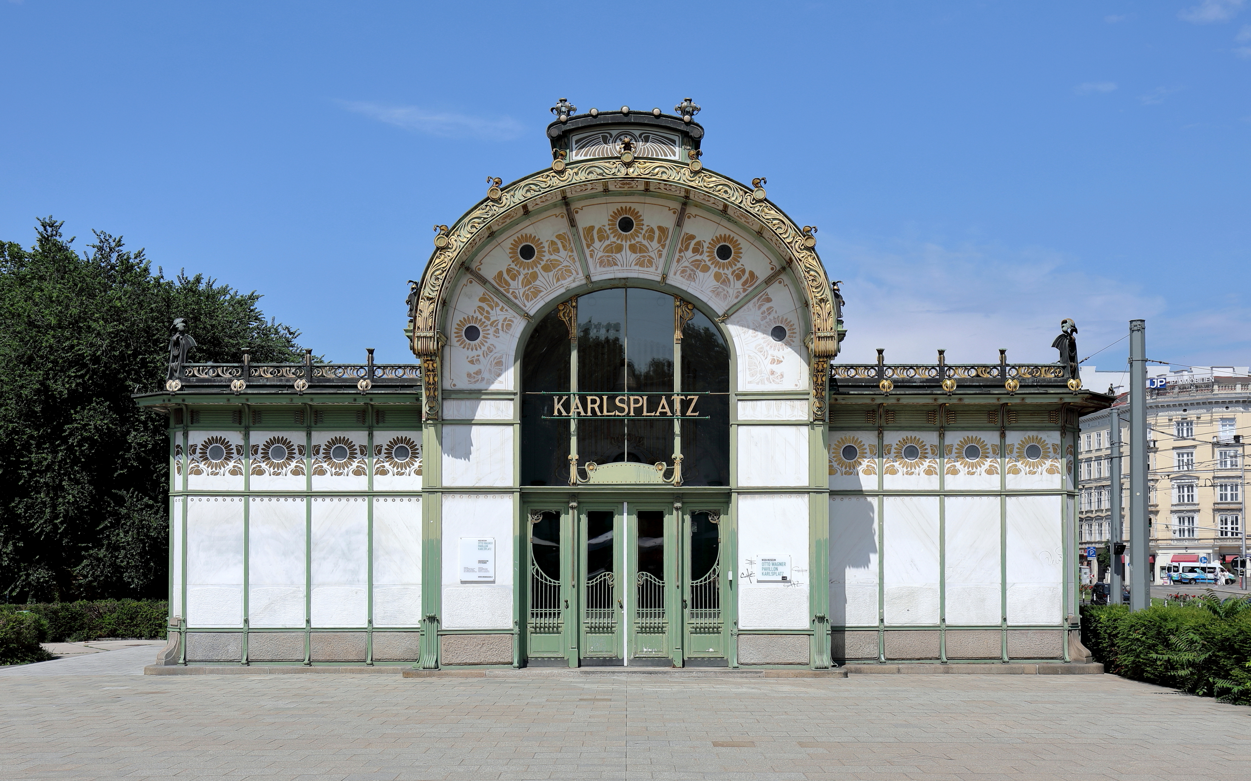 Ostansicht des ehemaligen westlichen Stadtbahn-Pavillons am Karlsplatz im 4. Wiener Gemeindebezirk Wieden.1898 wurden nach einem Entwurf von Otto Wagner zwei identische Zugangsgebäude für die Stadtbahnstation Karlsplatz errichtet. Die vielen dekorativen Details machten die Station zu einem Musterbeispiel des Wiener Jugendstils. Metall und Holz wurden in Apfelgrün gestrichen, der Signalfarbe der Stadtbahn. Hinzu kam Gold und weißer Marmor an der Außenseite. Durch den Bau der U-Bahn-Station Karlsplatz wurden die Pavillons abgetragen und nach Protesten 1977 wieder aufgestellt. Aktuell (2018) wird der westlich Pavillon von Wien Museum genutzt und der östliche als Kaffeehaus.